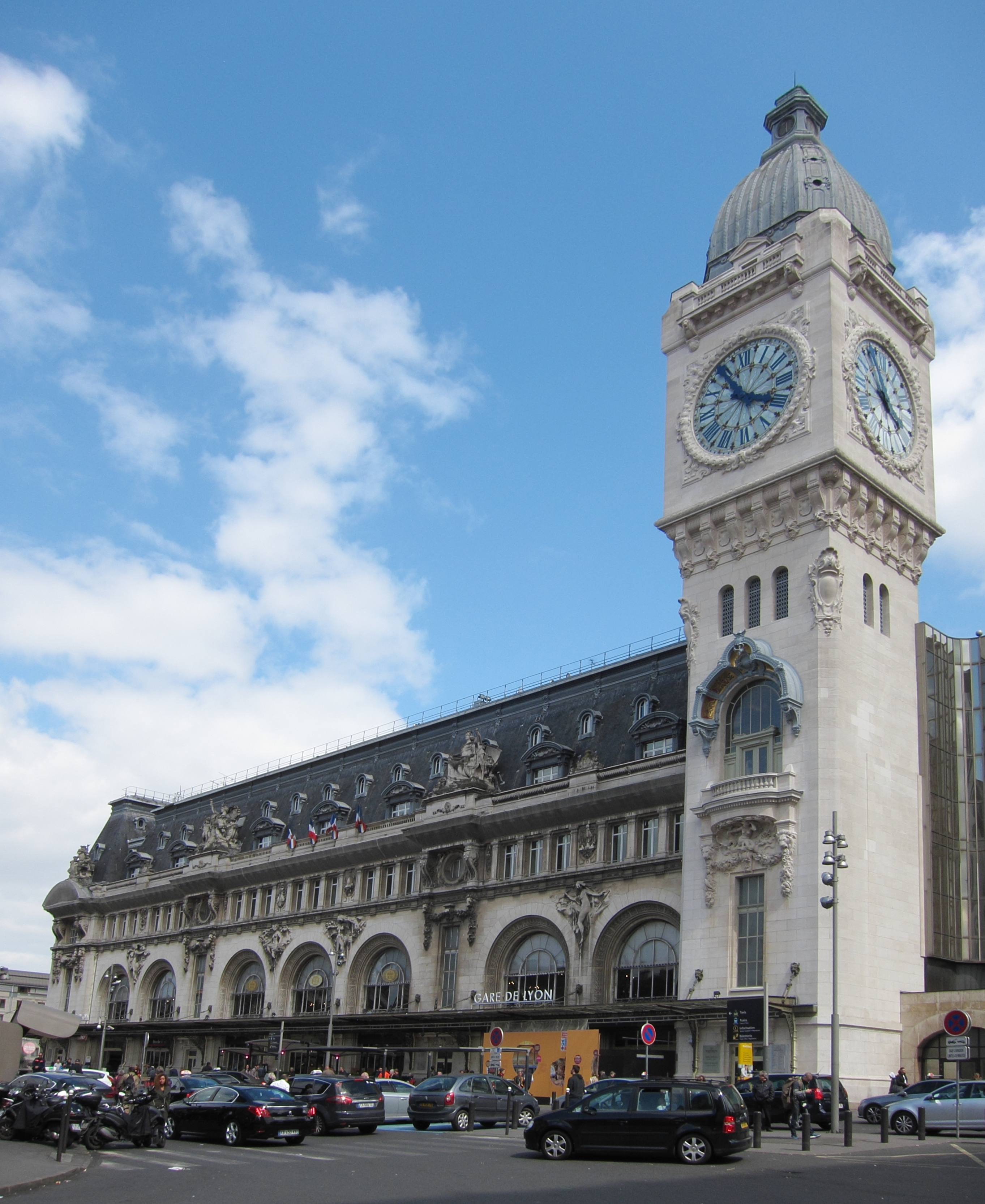 Gare de Lyon, Paris 12e